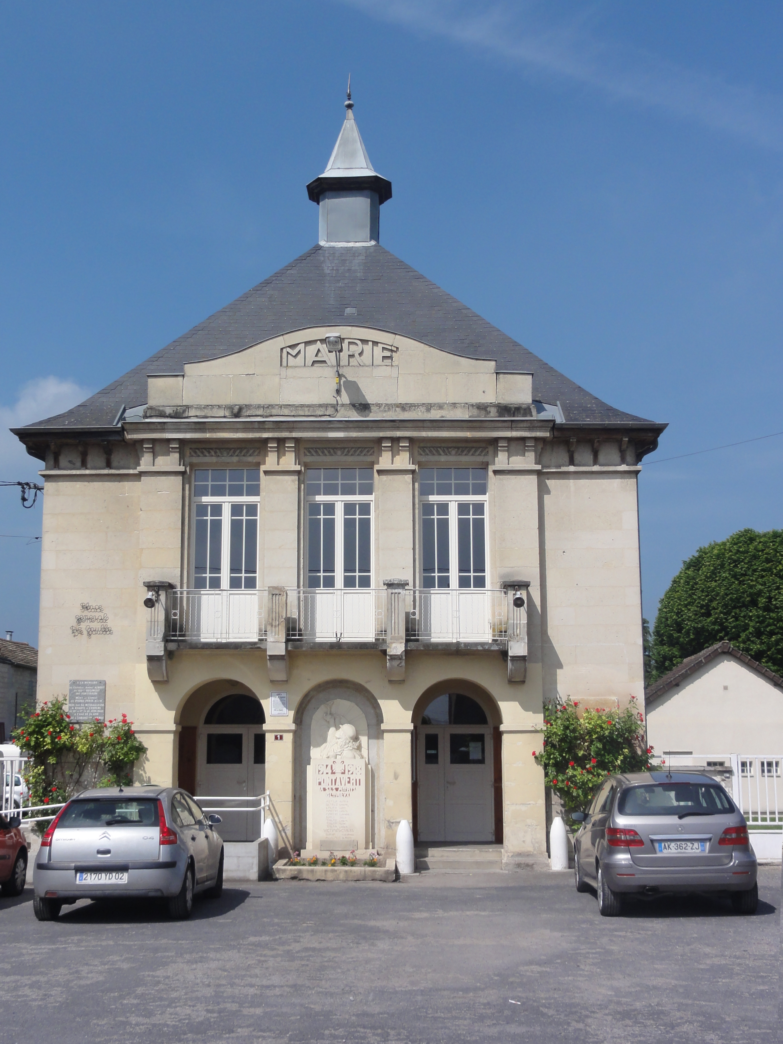 Pontavert (Aisne) Mairie